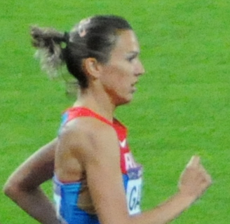 Course de 3000m steeple (JO Londres), Gulnara Galkina